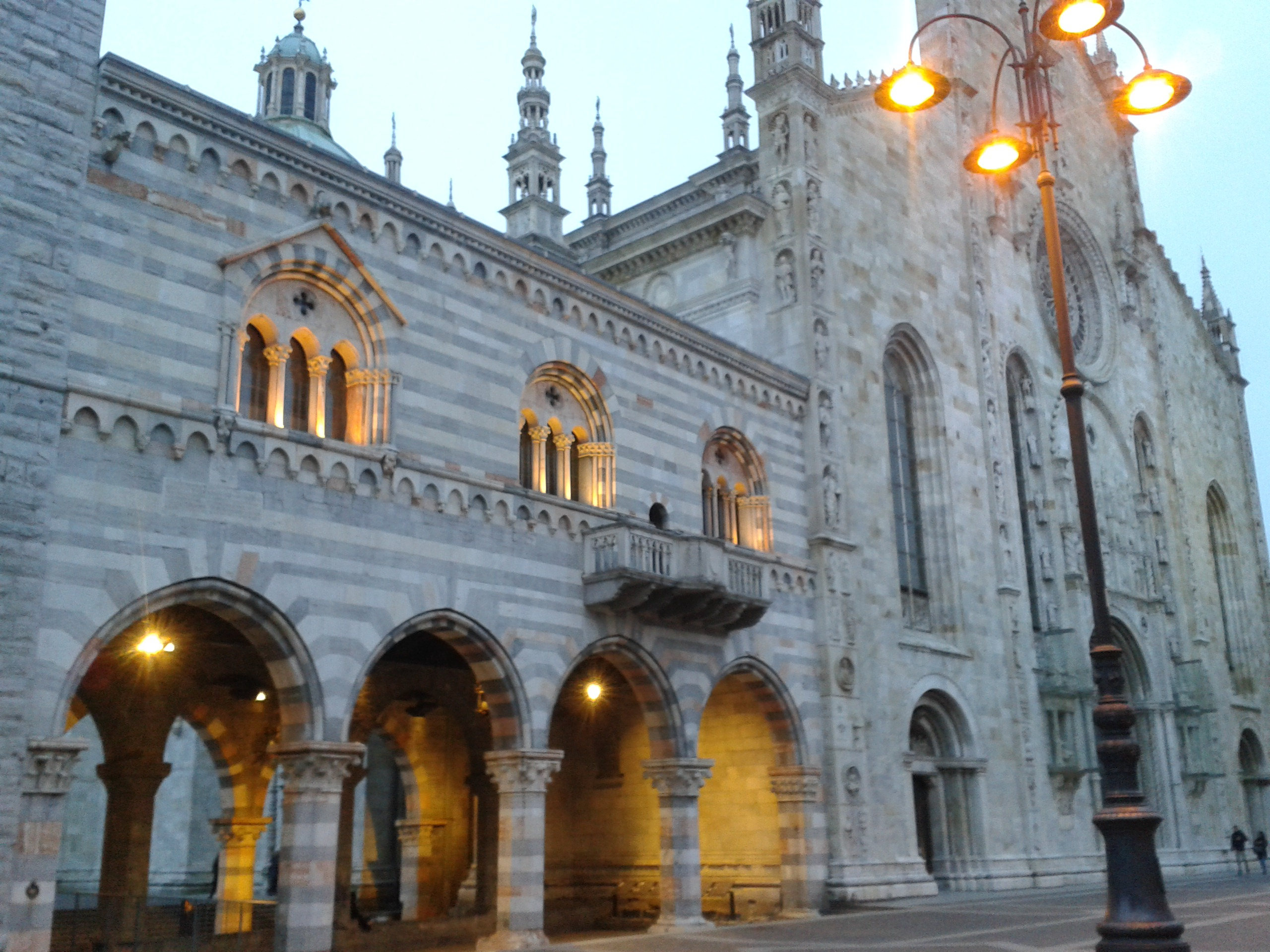 Fassade des Comer Doms mit angrenzendem Broletto